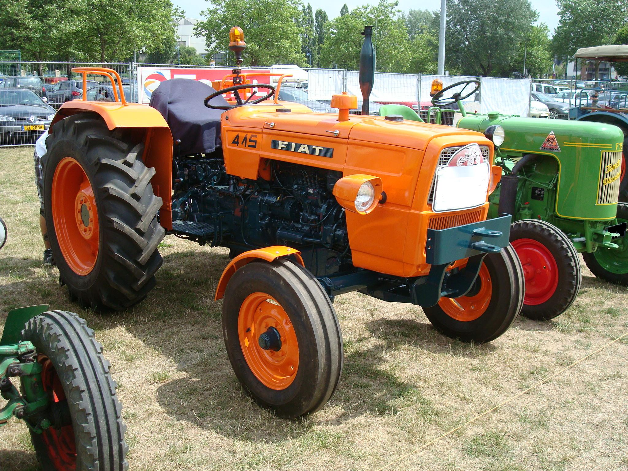 Traktor Fiat 415